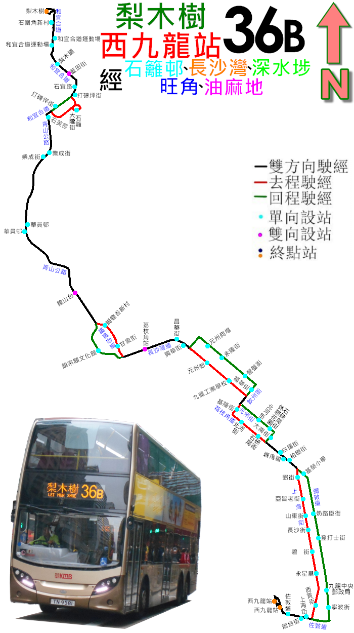 中文（香港）: 九巴36B線的走線圖